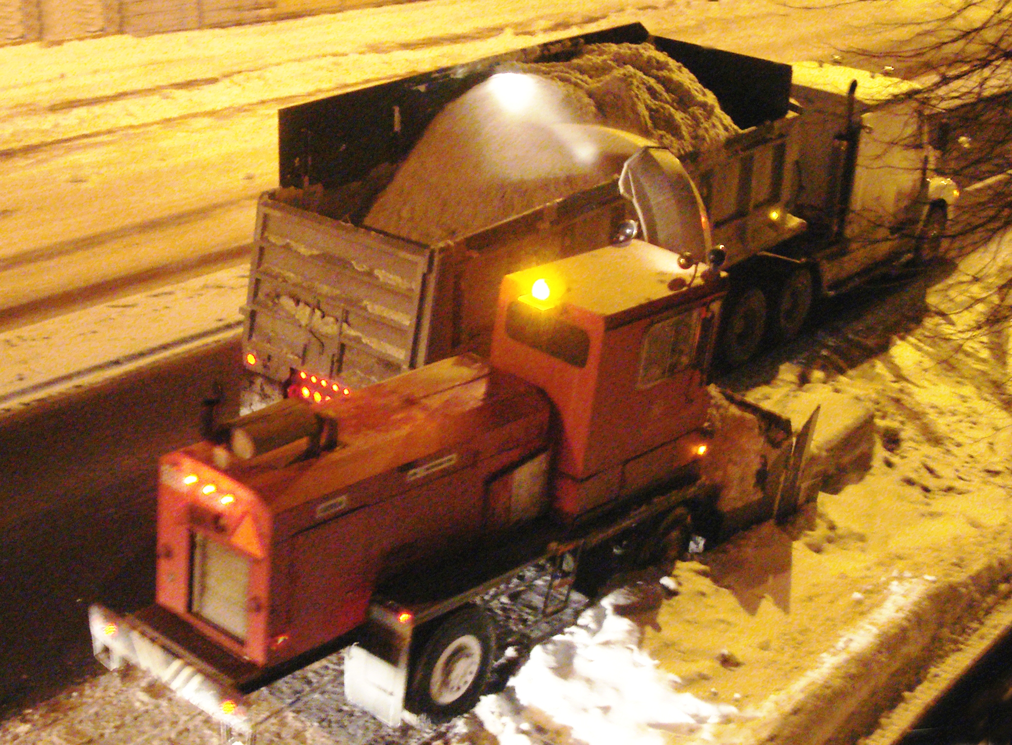 Déneigement d'une rue à Montréal (Québec) Canada